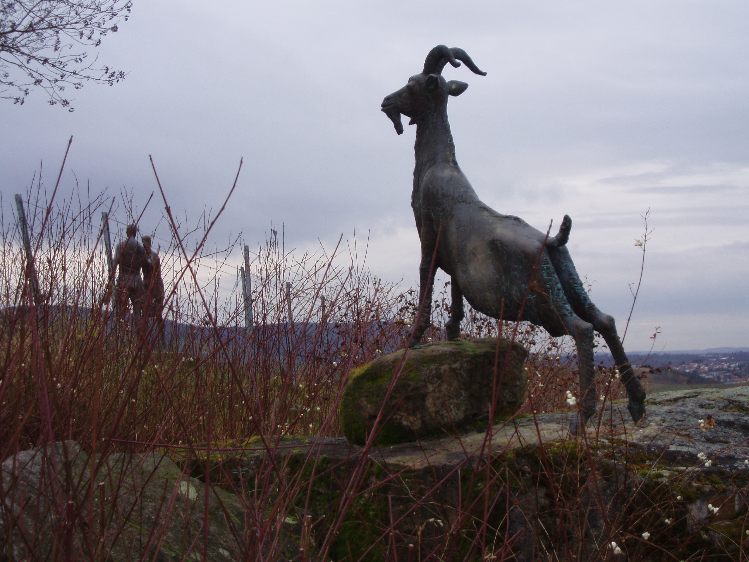 Skulpturenpfad in Strümpfelbach, Ziegenbock von Karl-Ulrich Nuss, 1989